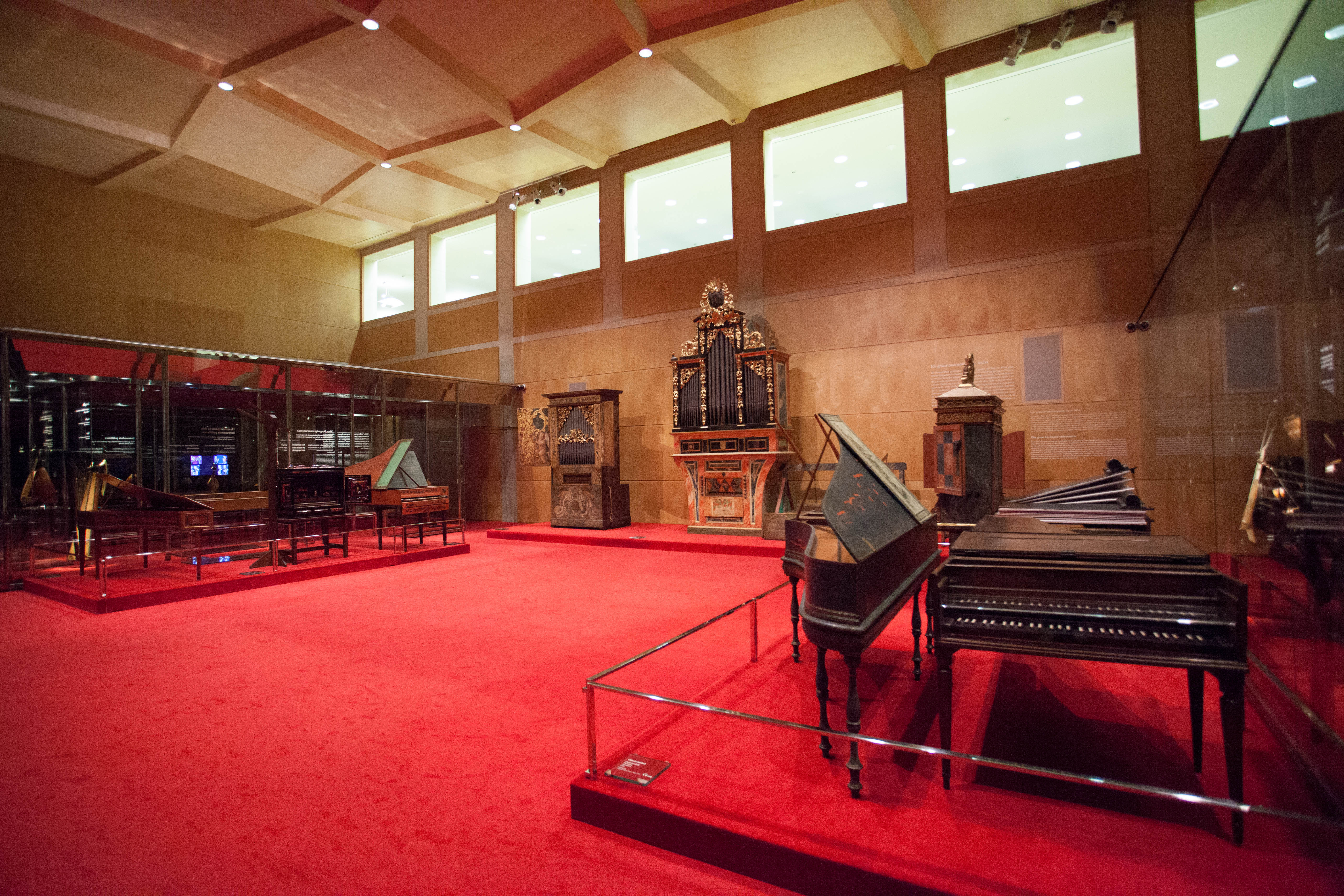 Sala gran, Museu de la Música de Barcelona